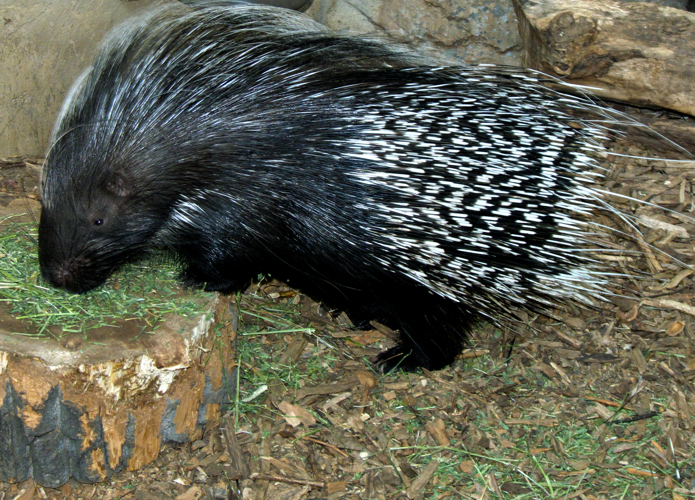 Z101 - 21